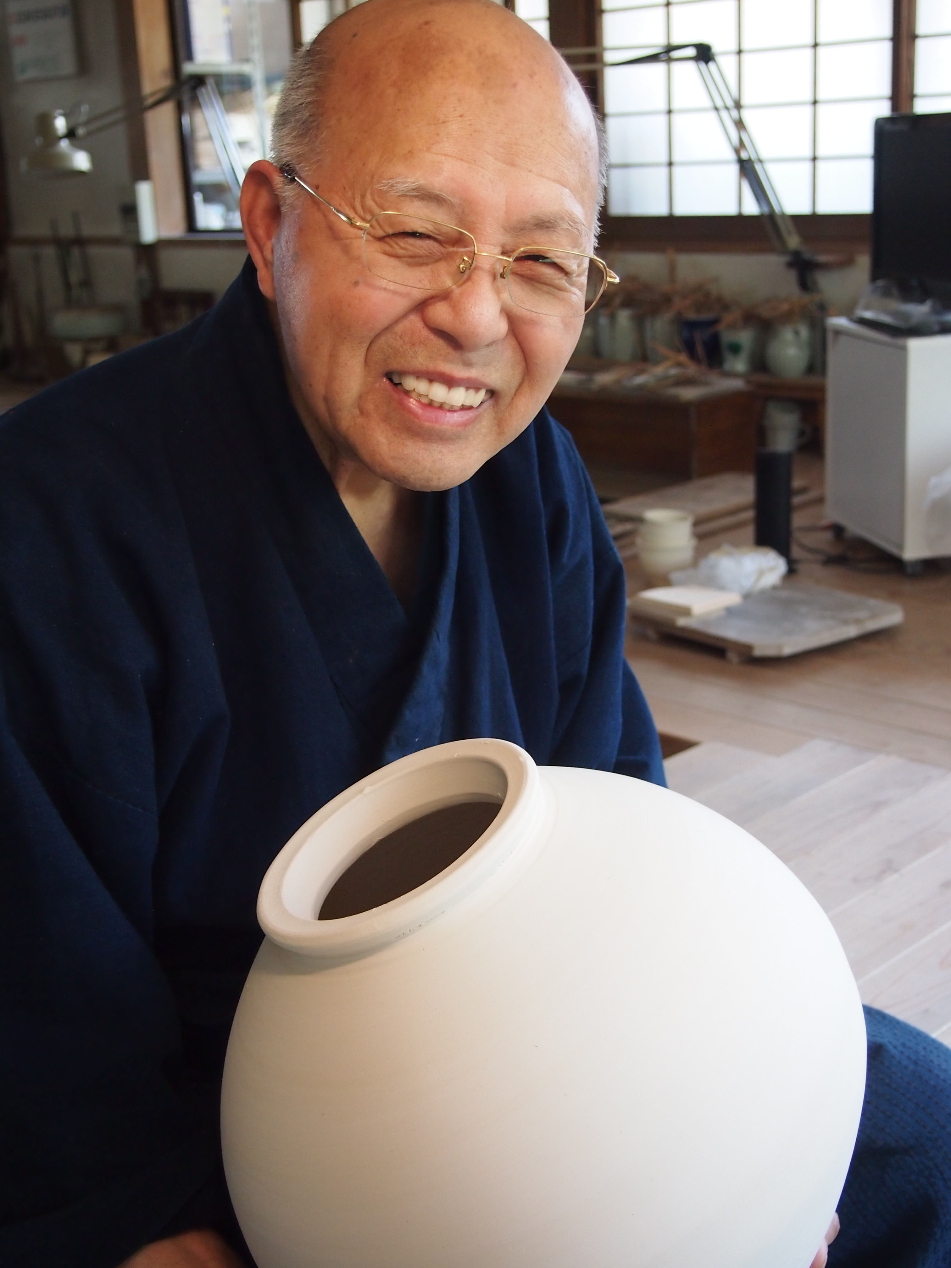 仕事場で作業する姿